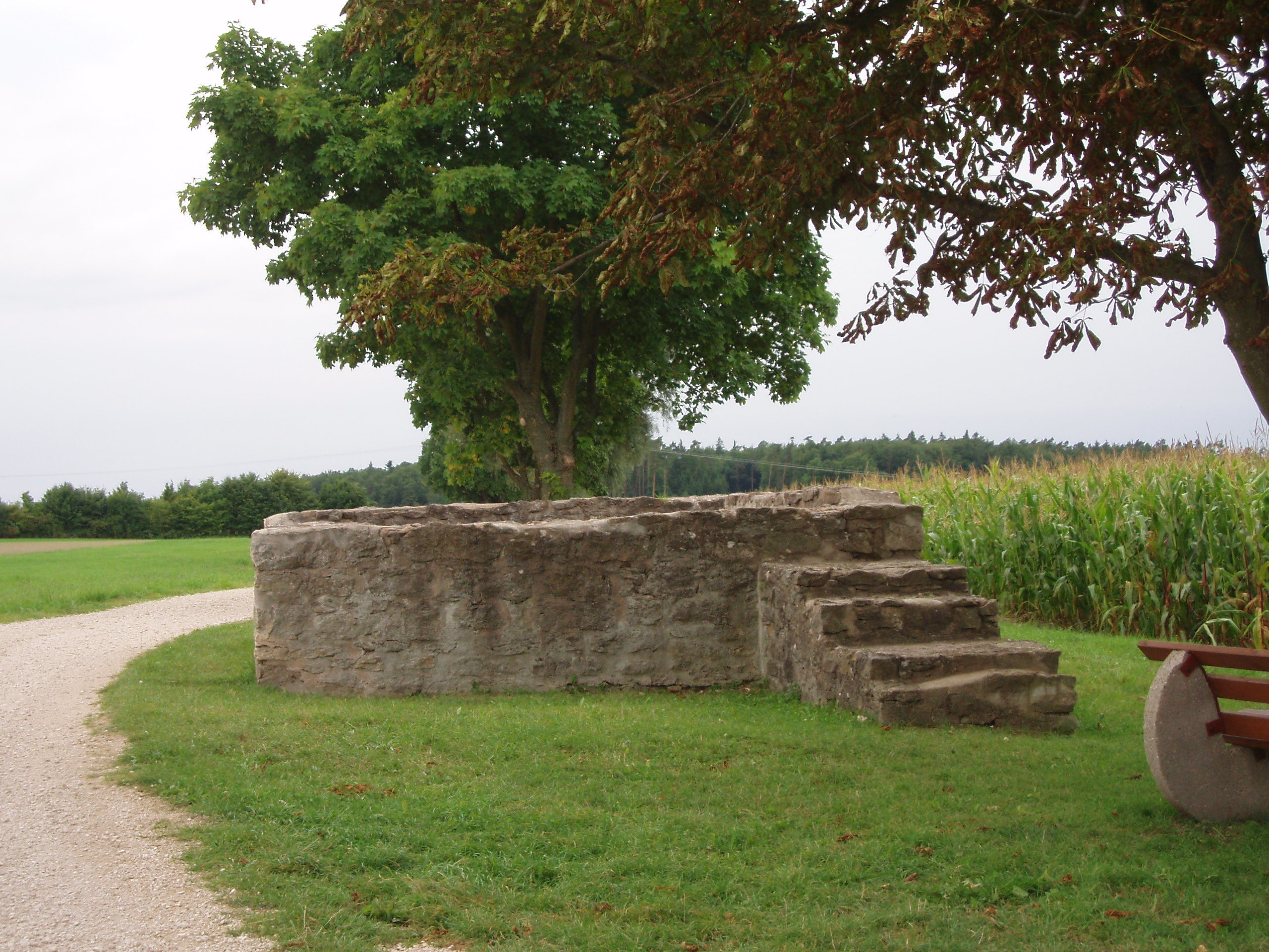 Limesturm Wp 14/17 bei Theilenhofen-Rittern